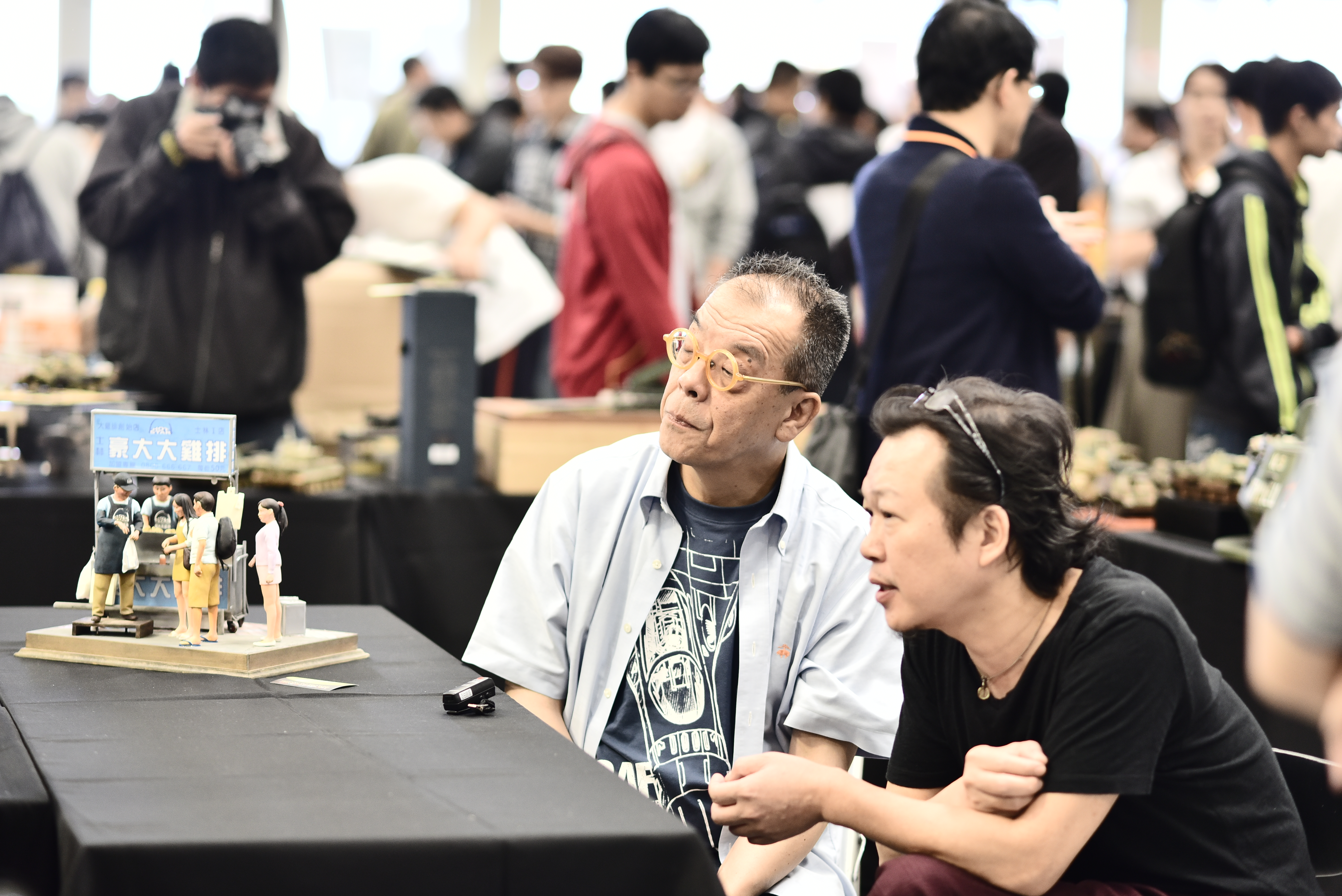 第5屆開拓模型祭（Reality Fantasy 5），山田卓司（中）帶其微縮模型《豪大大雞排》（左）出席，鄭鴻展（右）陪同。